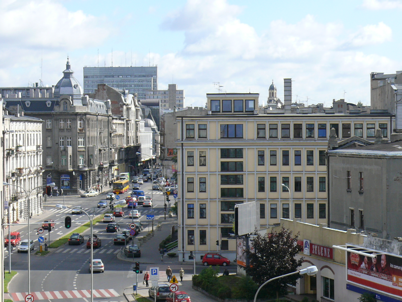 ul. Andrzeja Struga w Łodzi, na pierwszym planie skrzyżowanie z ul. Wólczańską, w głębi skrzyżowanie z al. Kościuszki